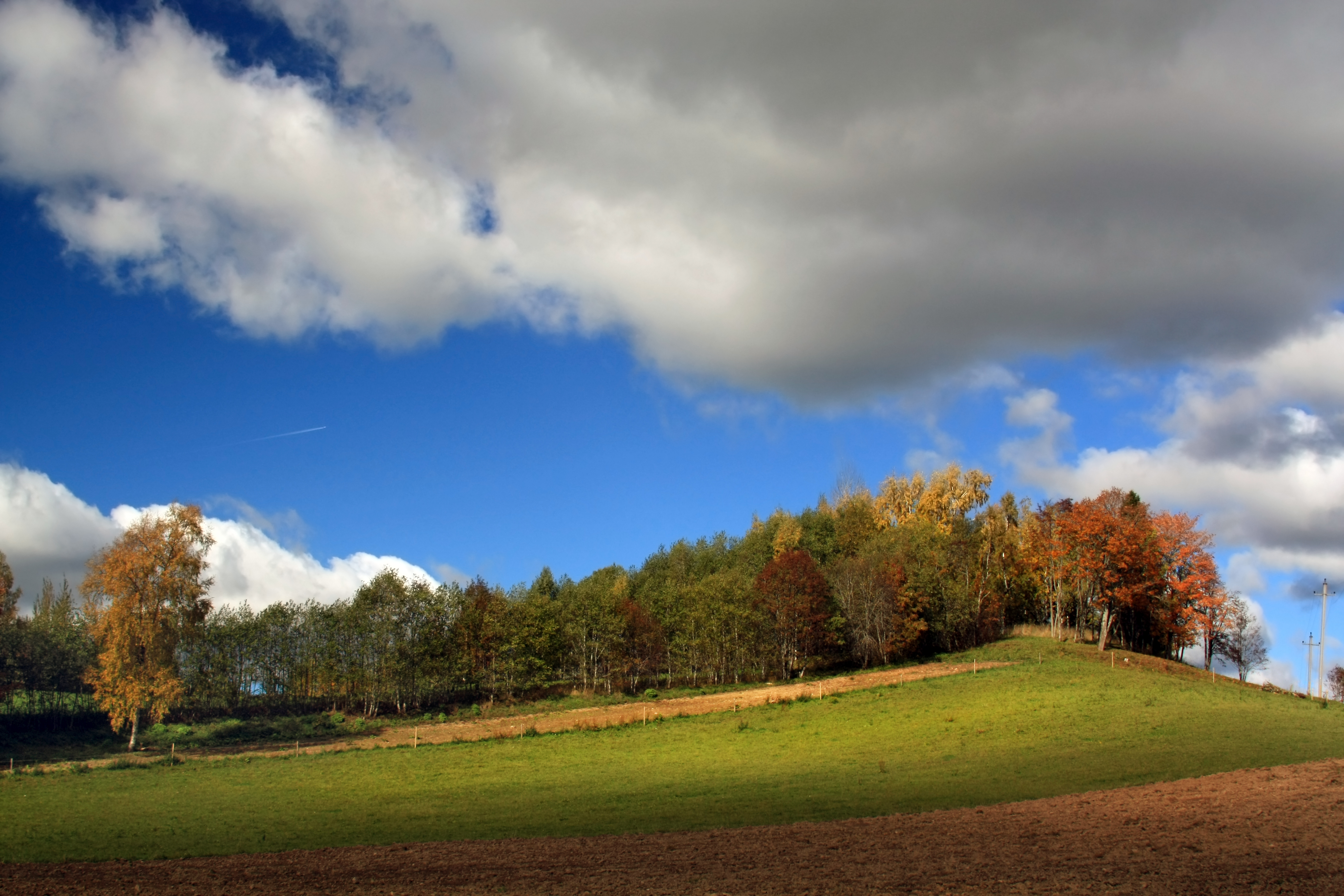 Karula maastik